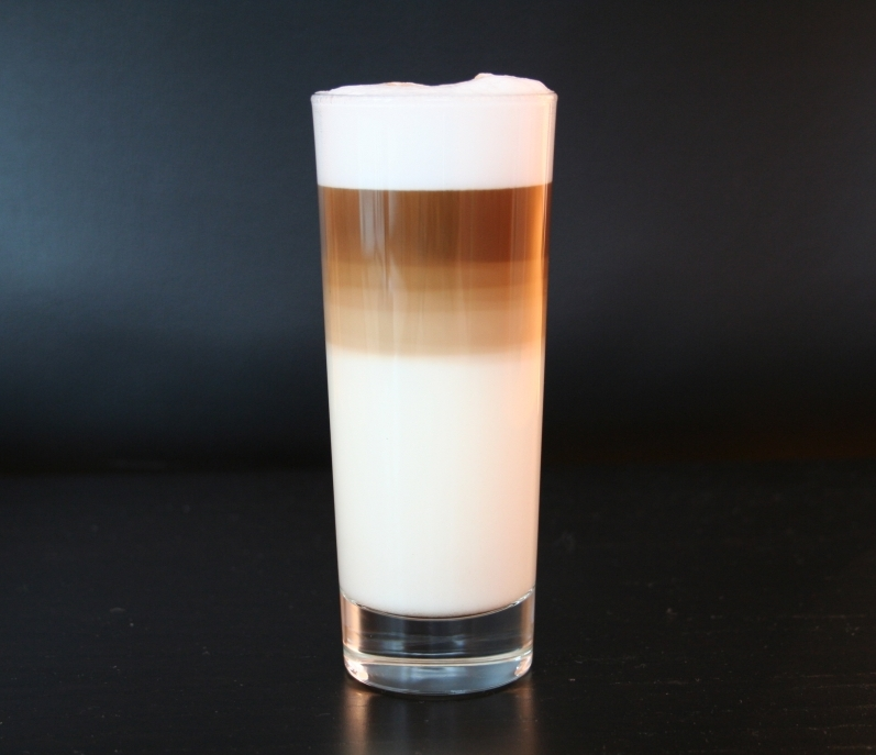 Ganzaufnahme eines Latte Macchiato. Man sieht die Schichtbildung durch Doppeldiffusion.